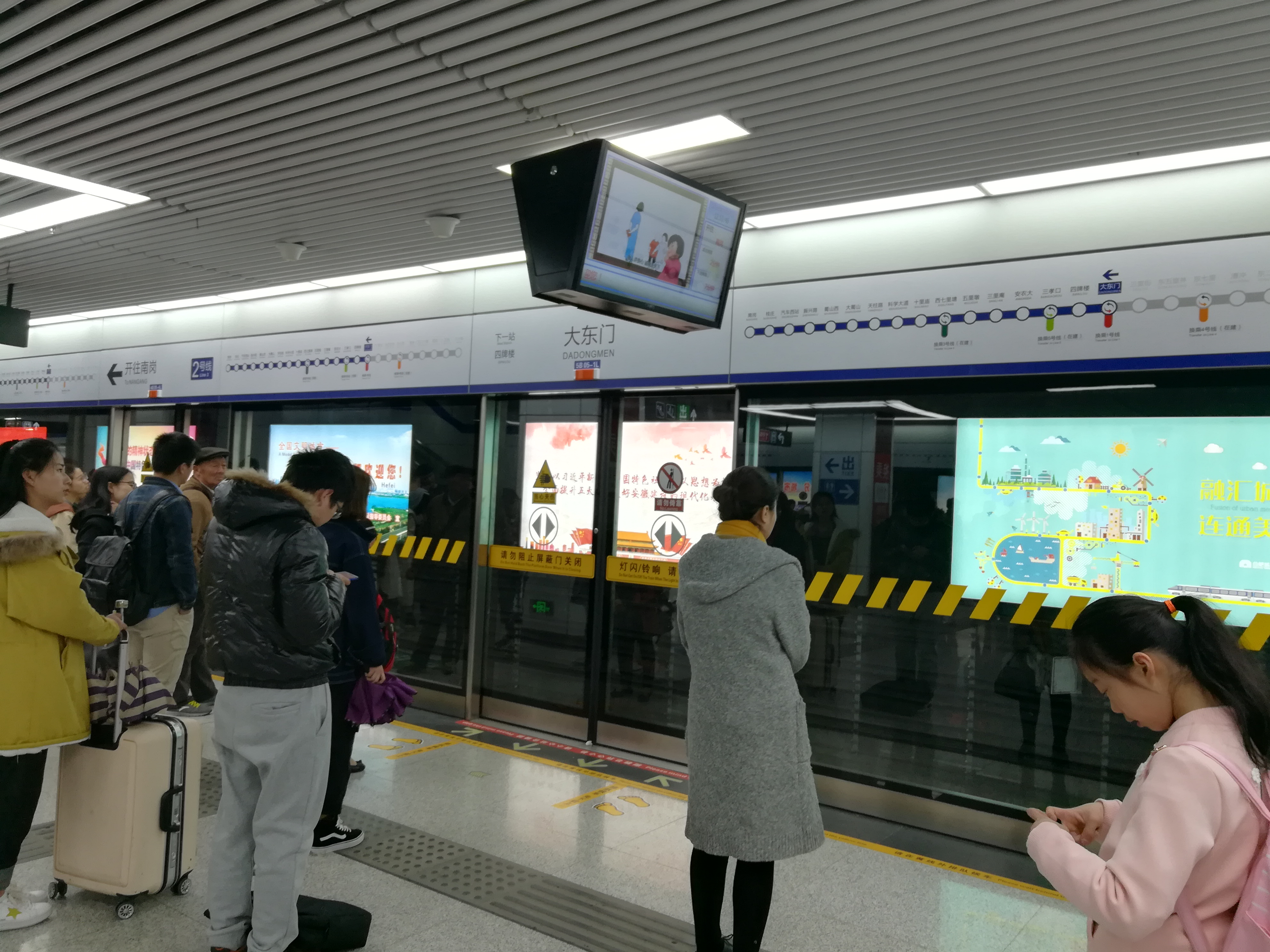 大东门站（地铁）